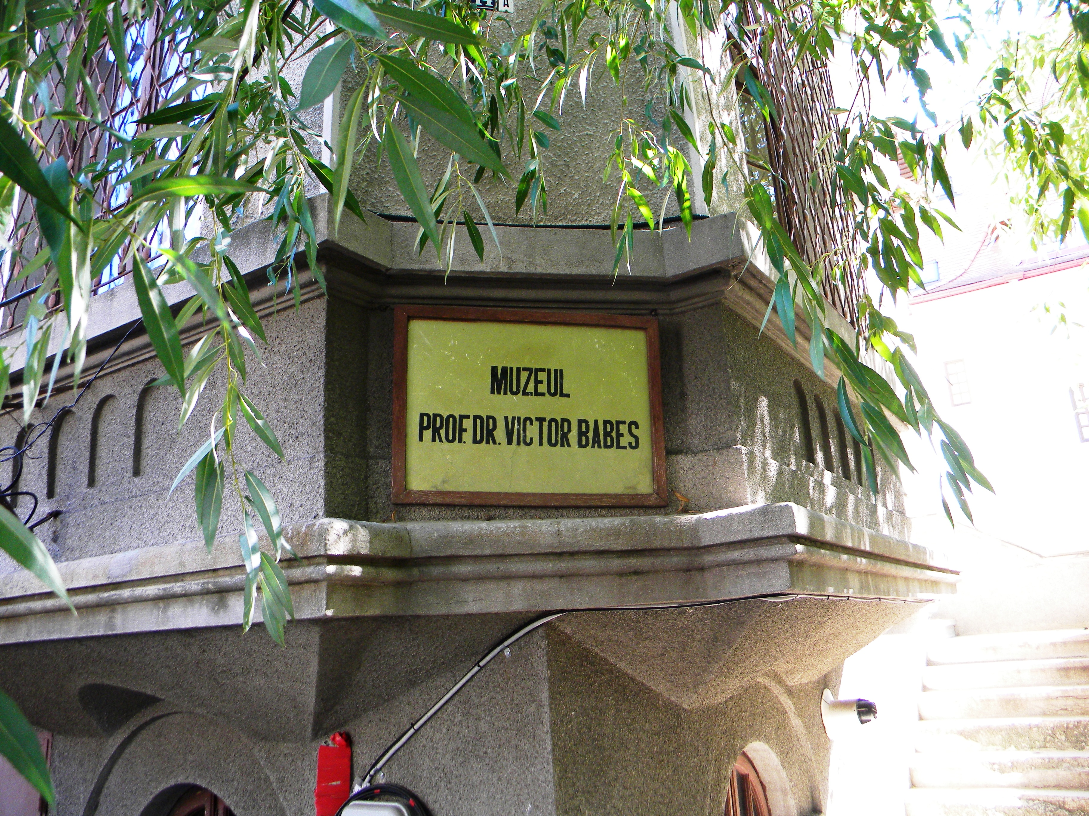 Bucuresti, Romania, Muzeul Memorial Prof. Dr. Victor Babes, Str. Andrei Muresanu nr. 14A; B-II-m-B-19267 (casa, detaliu 2)